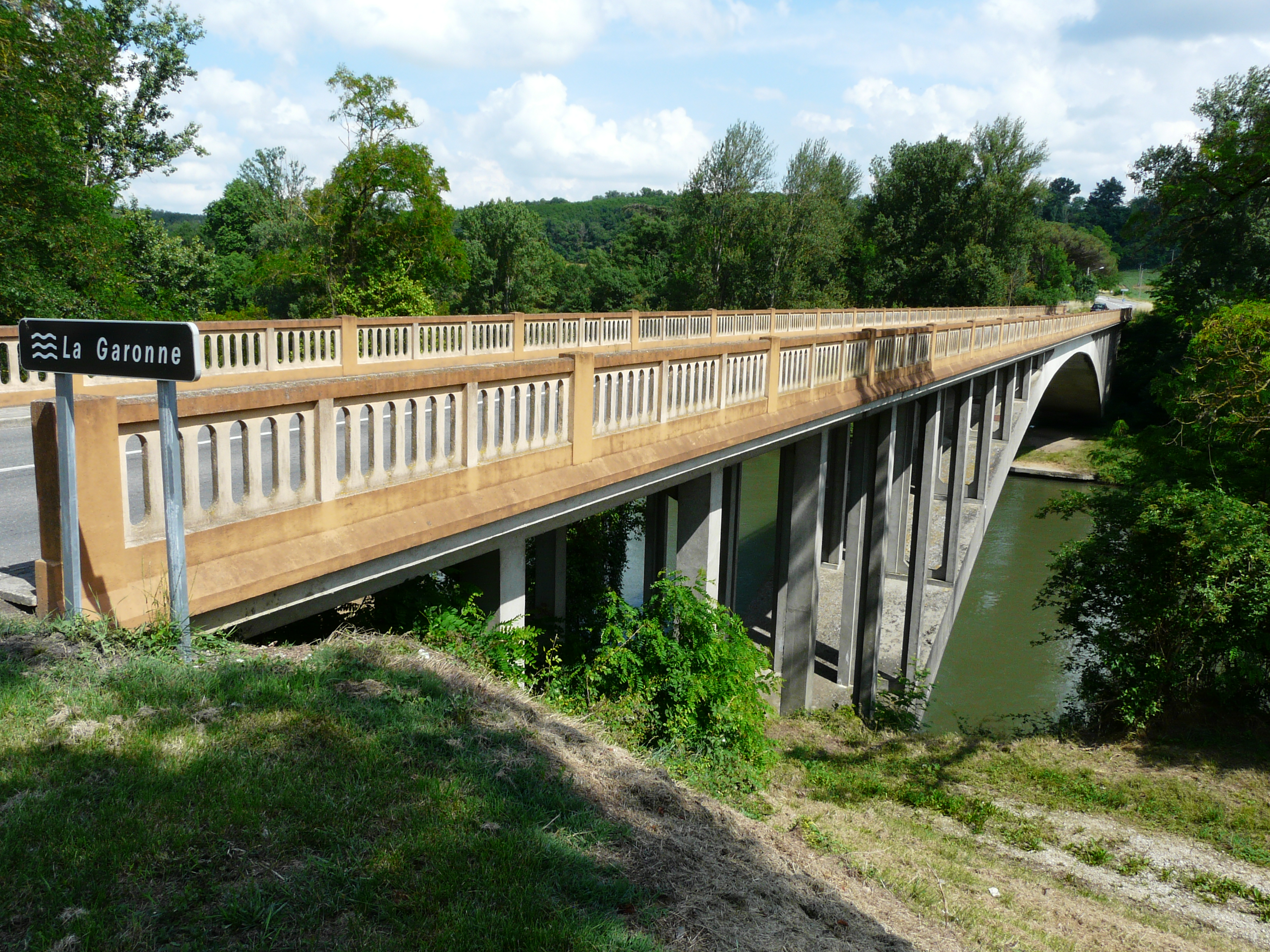 Le pont de la route départementale 25 sur la Garonne, entre Saint-Julien-sur-Garonne (sur l'autre rive) et Rieux-Volvestre (de l'autre côté), Haute-Garonne, France.